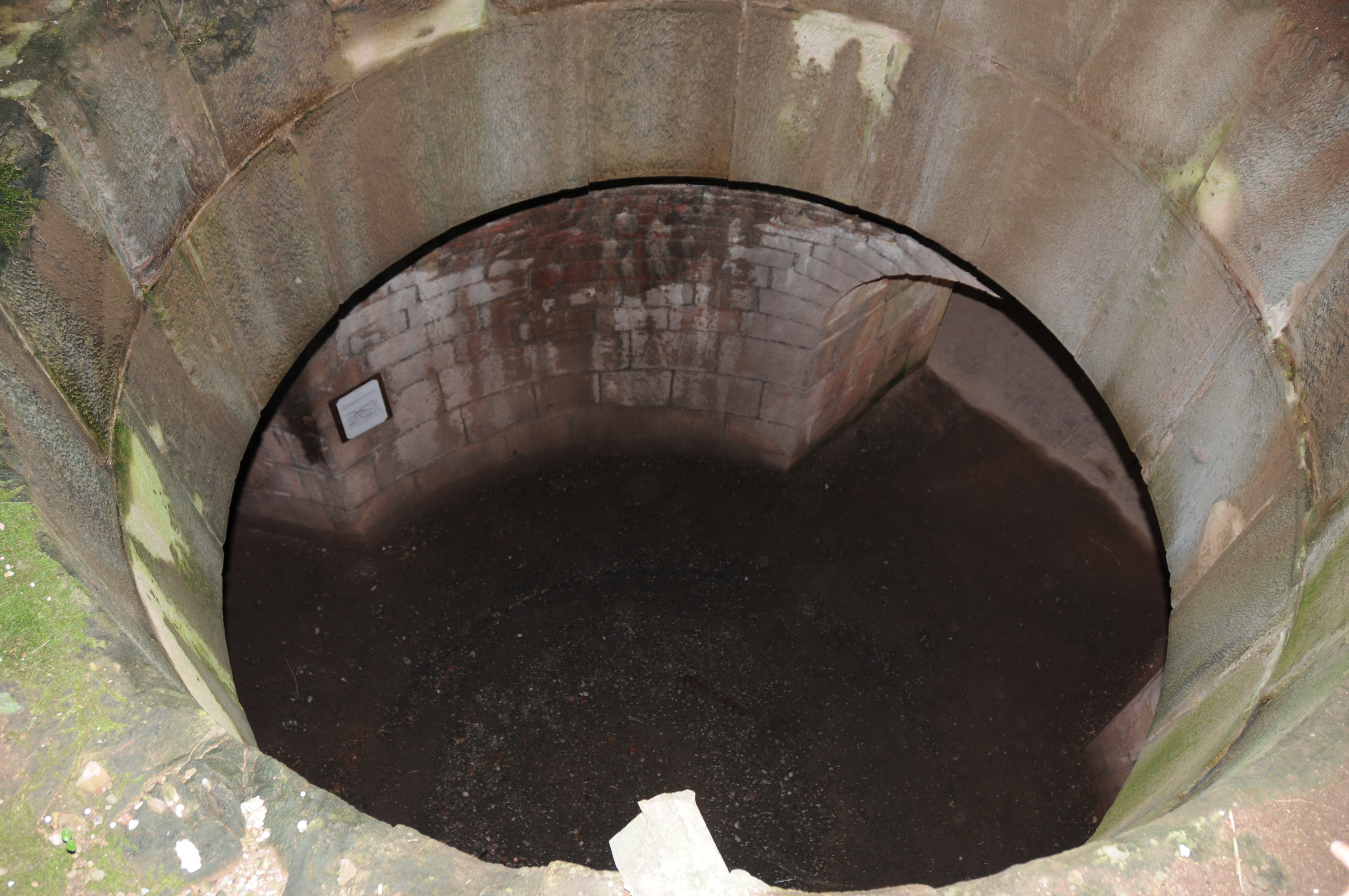 Emplacement d'une des 2 tourelles du fort. Giromagny fortifications.